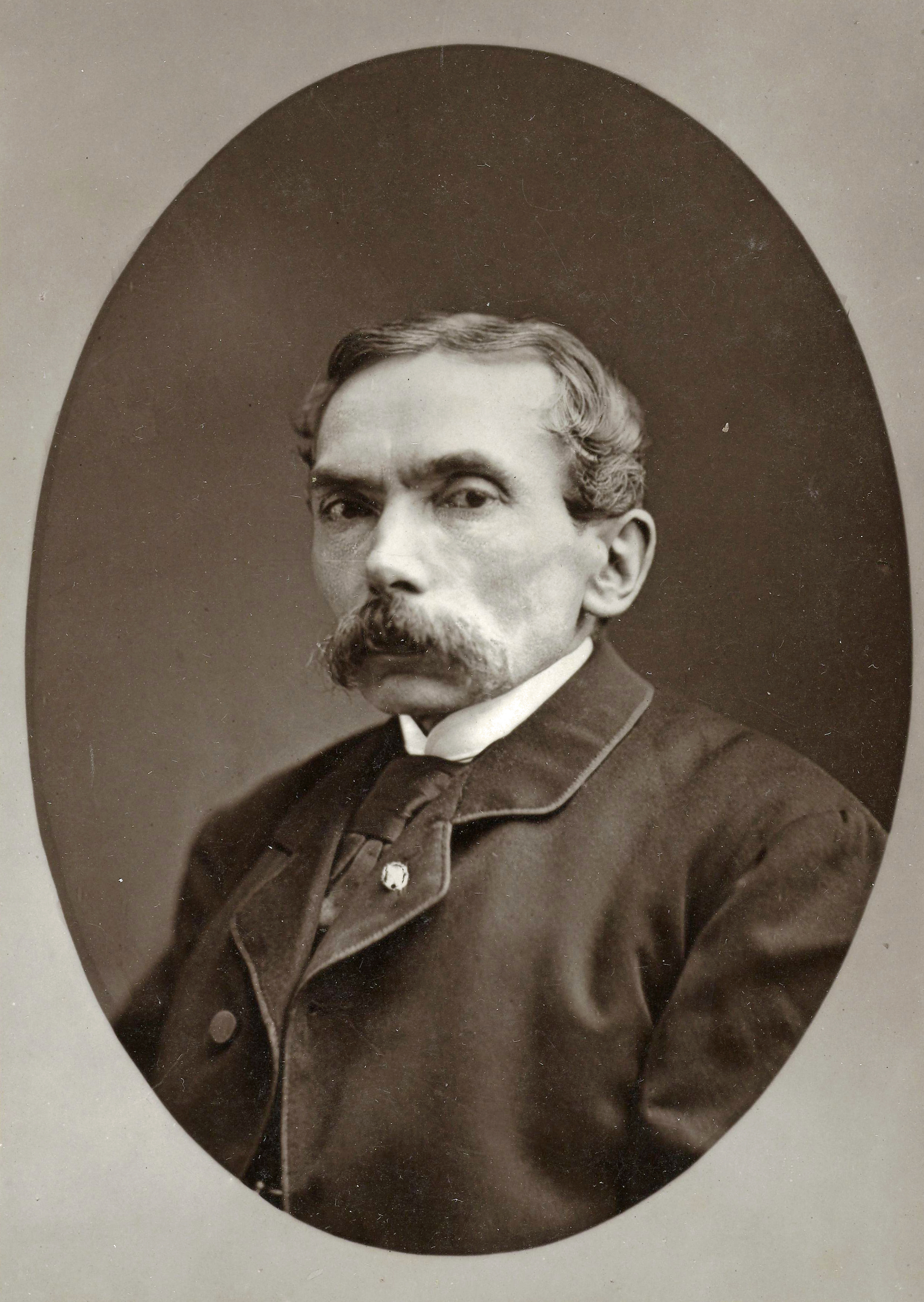 Jan Willem van Borselen